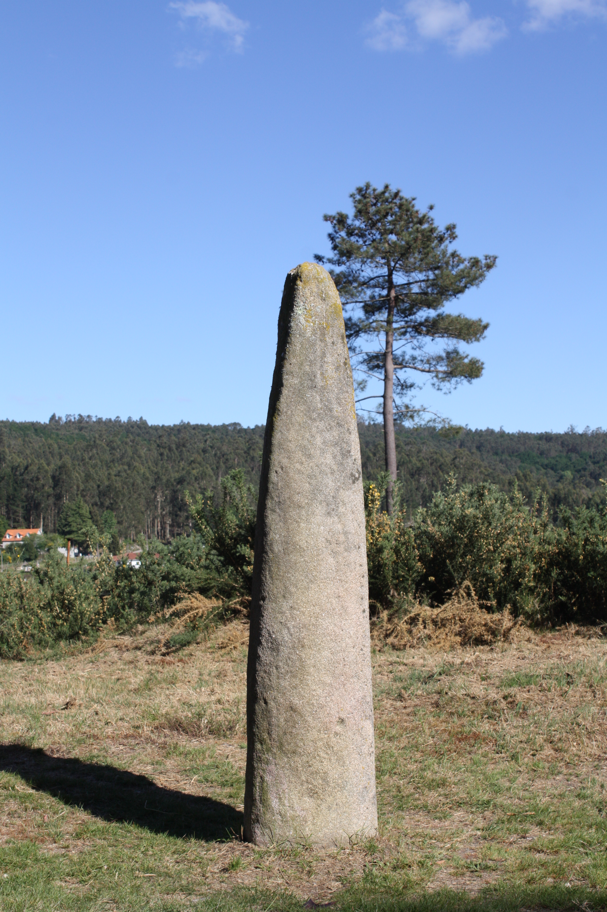 Lapa de Gargantáns (Moraña, Pontevedra)